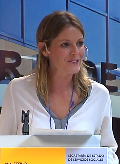 José Antonio de Santiago-Juárez asiste a la firma de la Declaración de Salamanca.